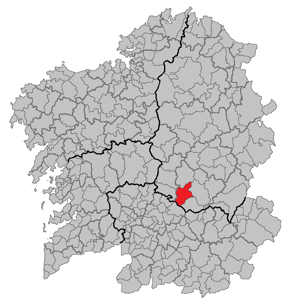 Mapa coa localización do concello de Pantón.